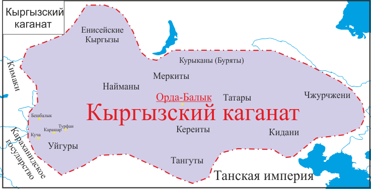 Политическая карта Кыргызского каганата